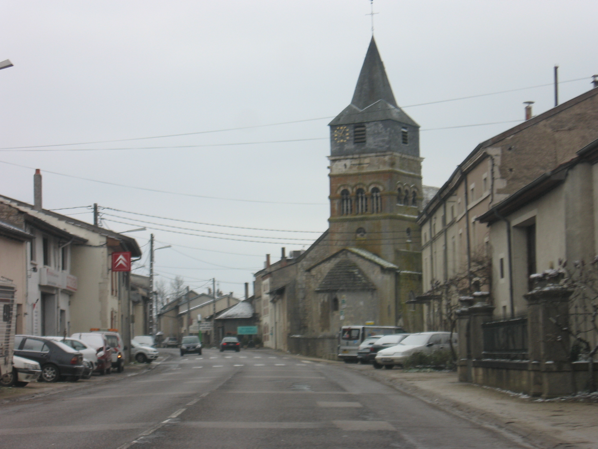 Autreville, Vosges